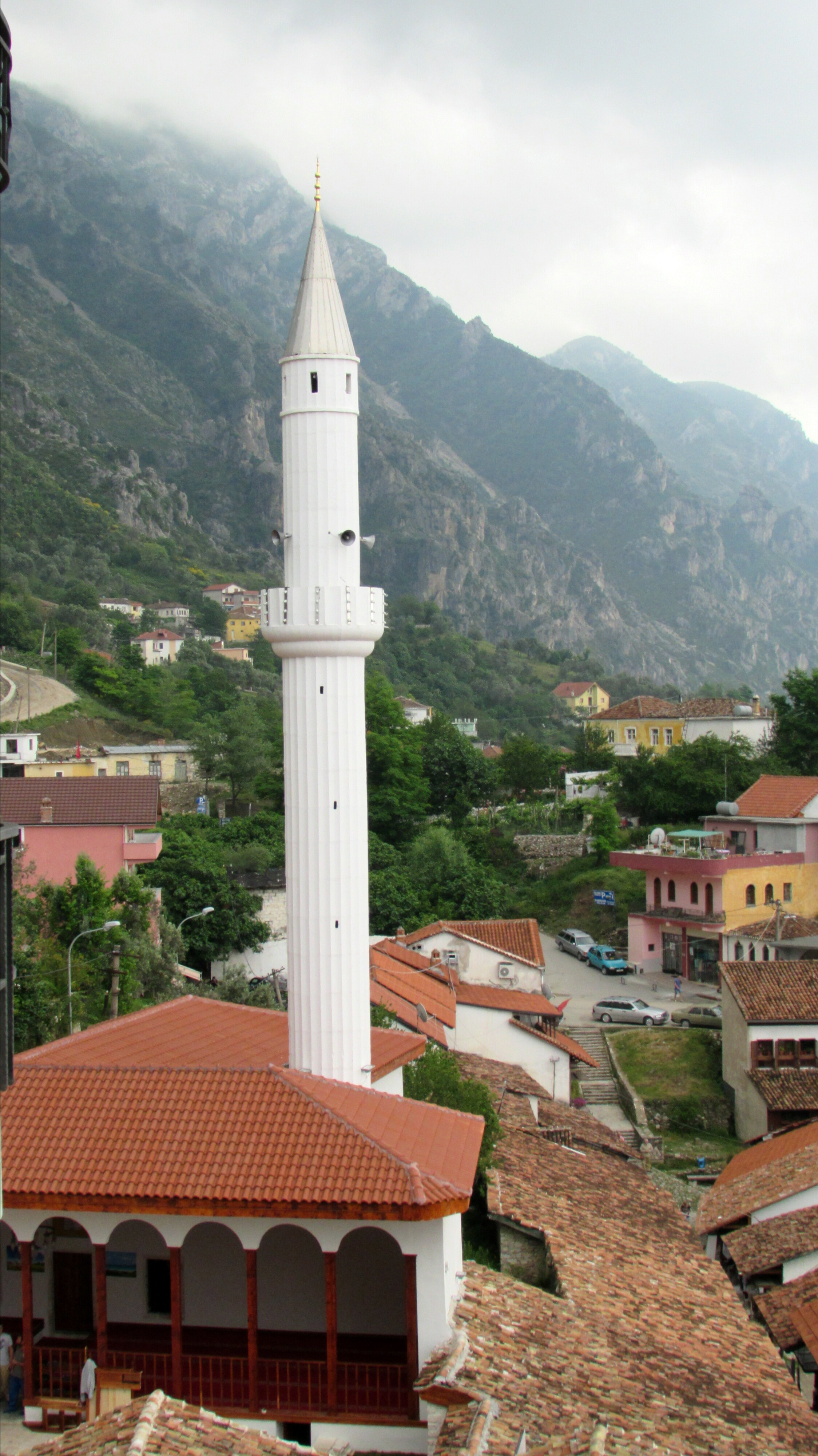 KrujaBasarMoschee2014